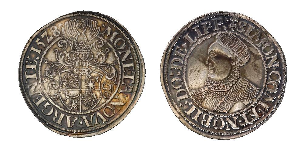 Lippischer Taler von 1528; "SIMON COM ET NOBIL DO DE LIPP" (Simon, Graf und Edler Herr zur Lippe). Auf der Rückseite gibt es eine weitere Umschrift den Wert der Münze mit der lateinischen Bezeichnung für Taler "montea nova argente" und Jahreszahl "1528" an. Durchmesser: 40,8 mm; Gewicht: 28,67 g; (Mit freundlicher Genehmigung aus der Münzsammlung des Lippischen Landesmuseums, Detmold)